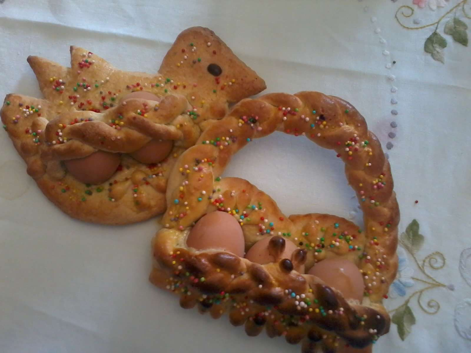 Cuddura cull'ova a forma di colomba ed a forma di cesto